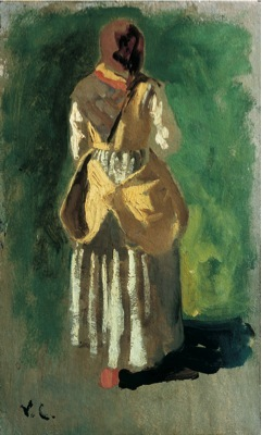 Contadina a Montemurlo